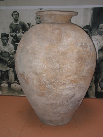 Sello "Gabriel Redolat"(1578-1601)